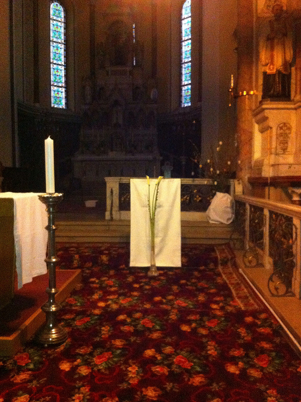 Innenraum von St. Anton v.P. Wien XV. - Ambo